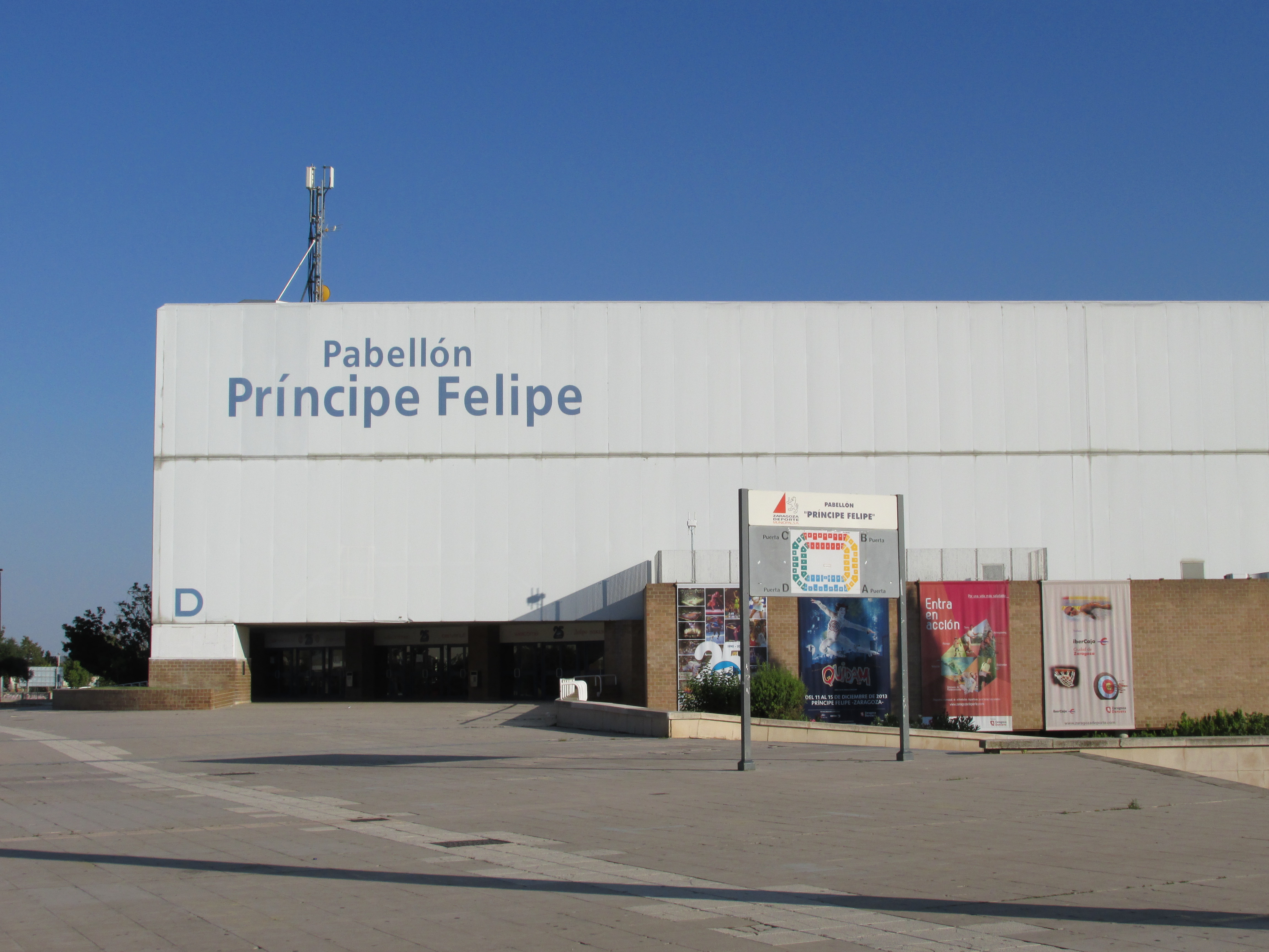 Pabellon Principe Felipe 2015